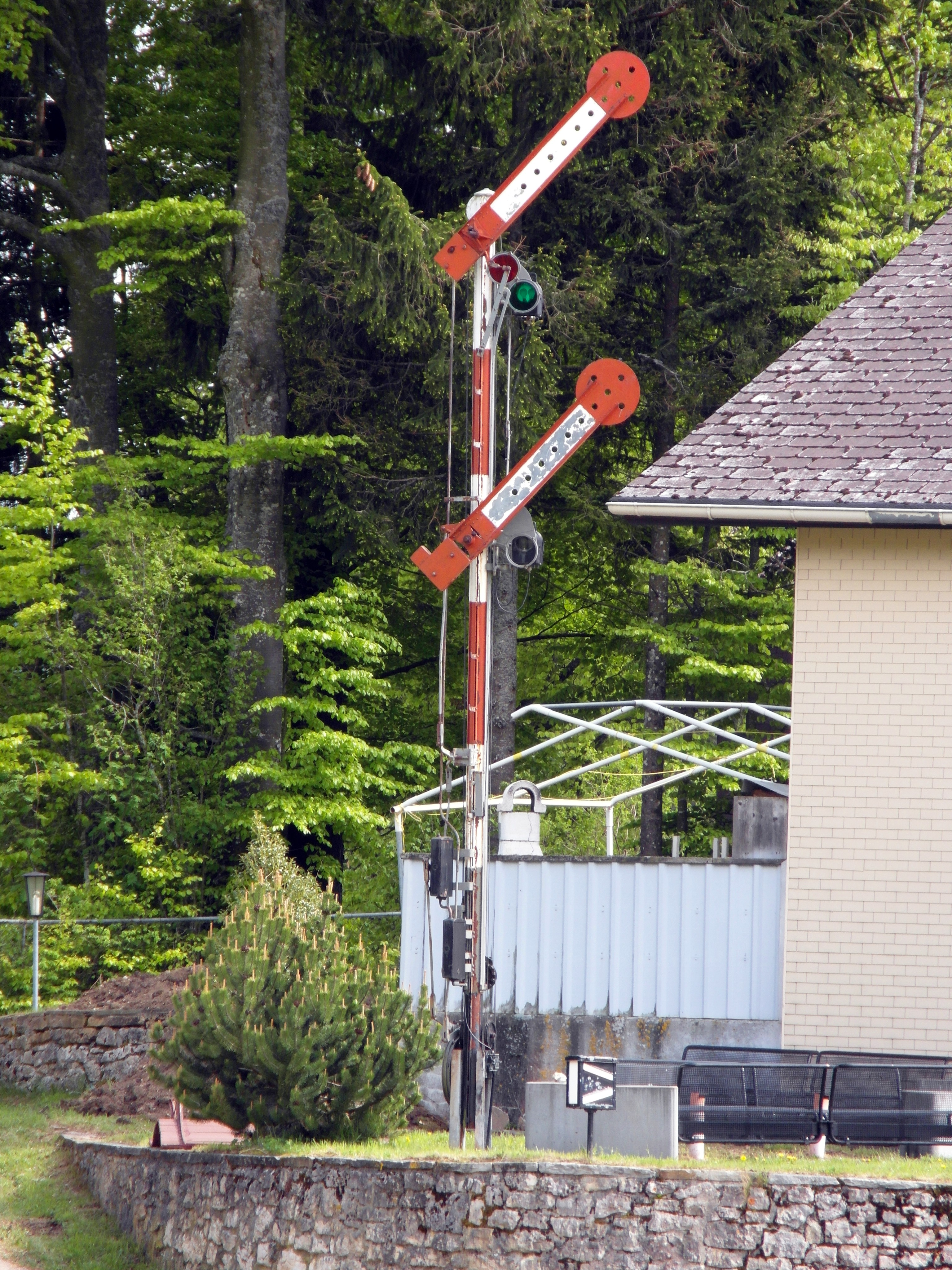 Der Bewohner hat seinen Garten hier, wirklich fern jeder Eisenbahn, mit sicherungstechnischen Utensilien verziert. Das Formsignal ist eine typische Schweizer Ausführung.